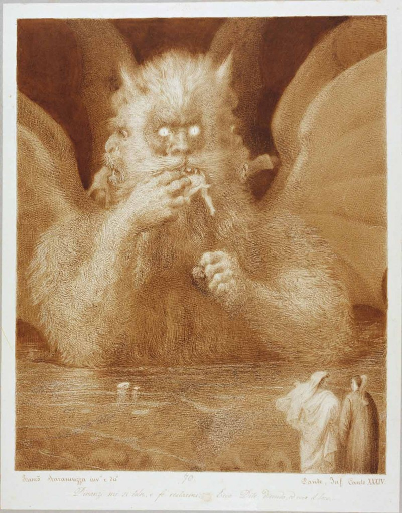 Lucifero